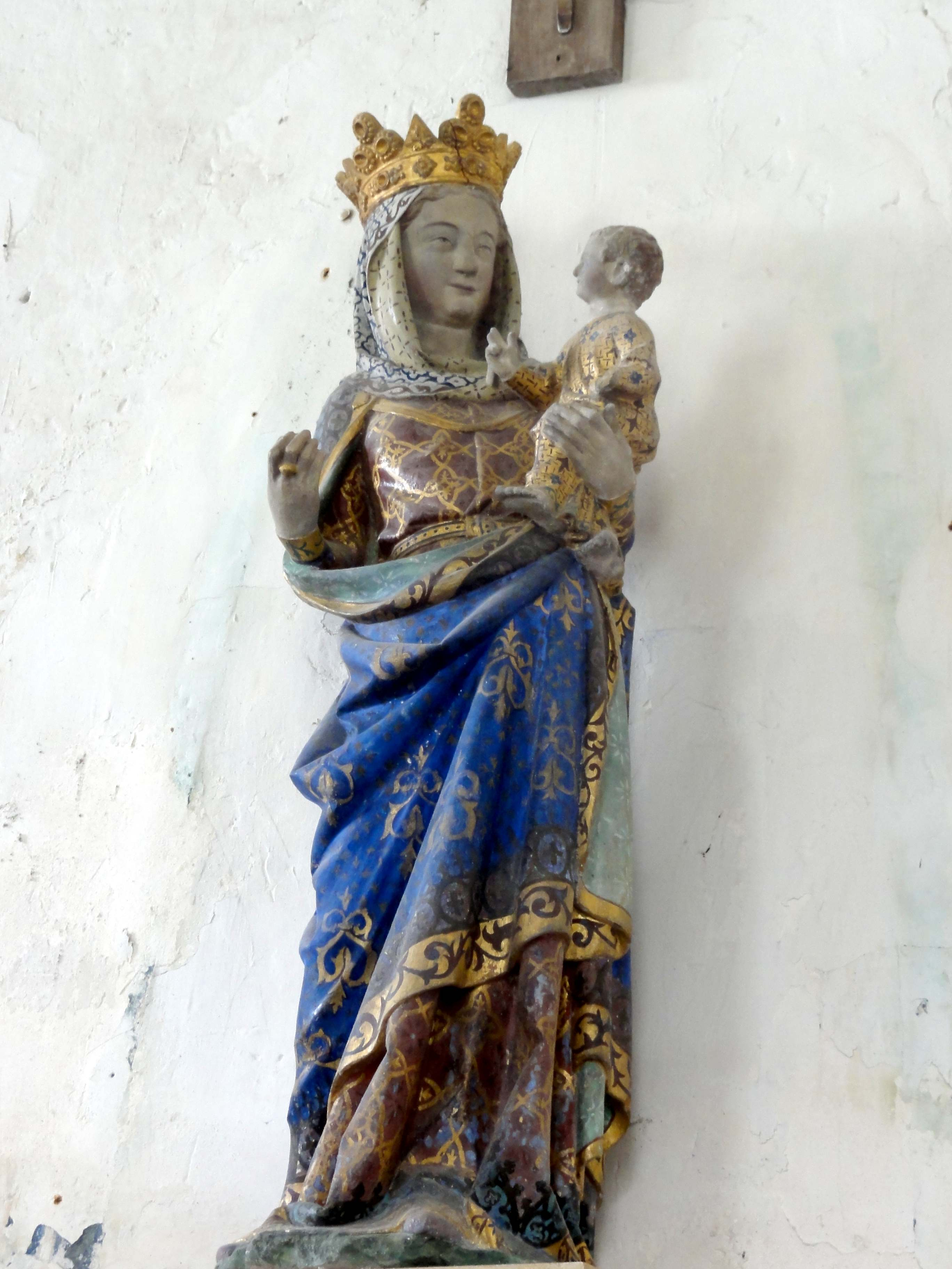 Vierge à l'Enfant du XIVe siècle.